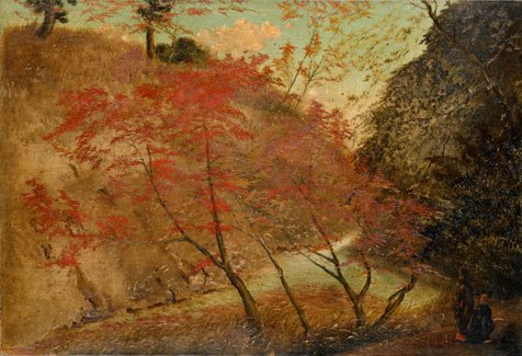 Autumn Leaves in Takinogawa